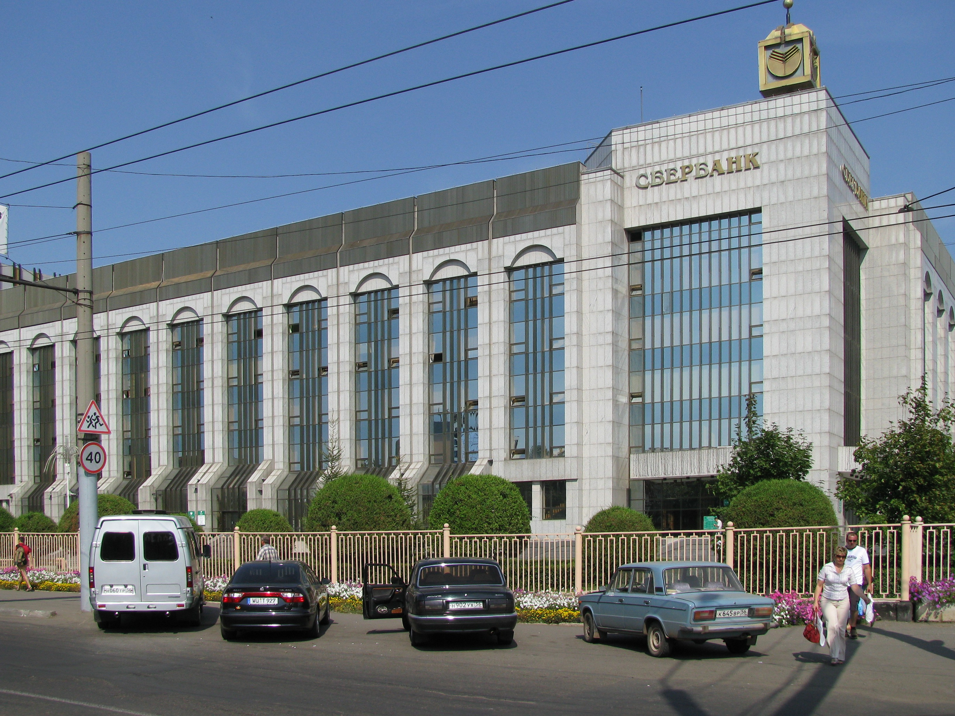 Здание Сбербанка в Оренбурге.